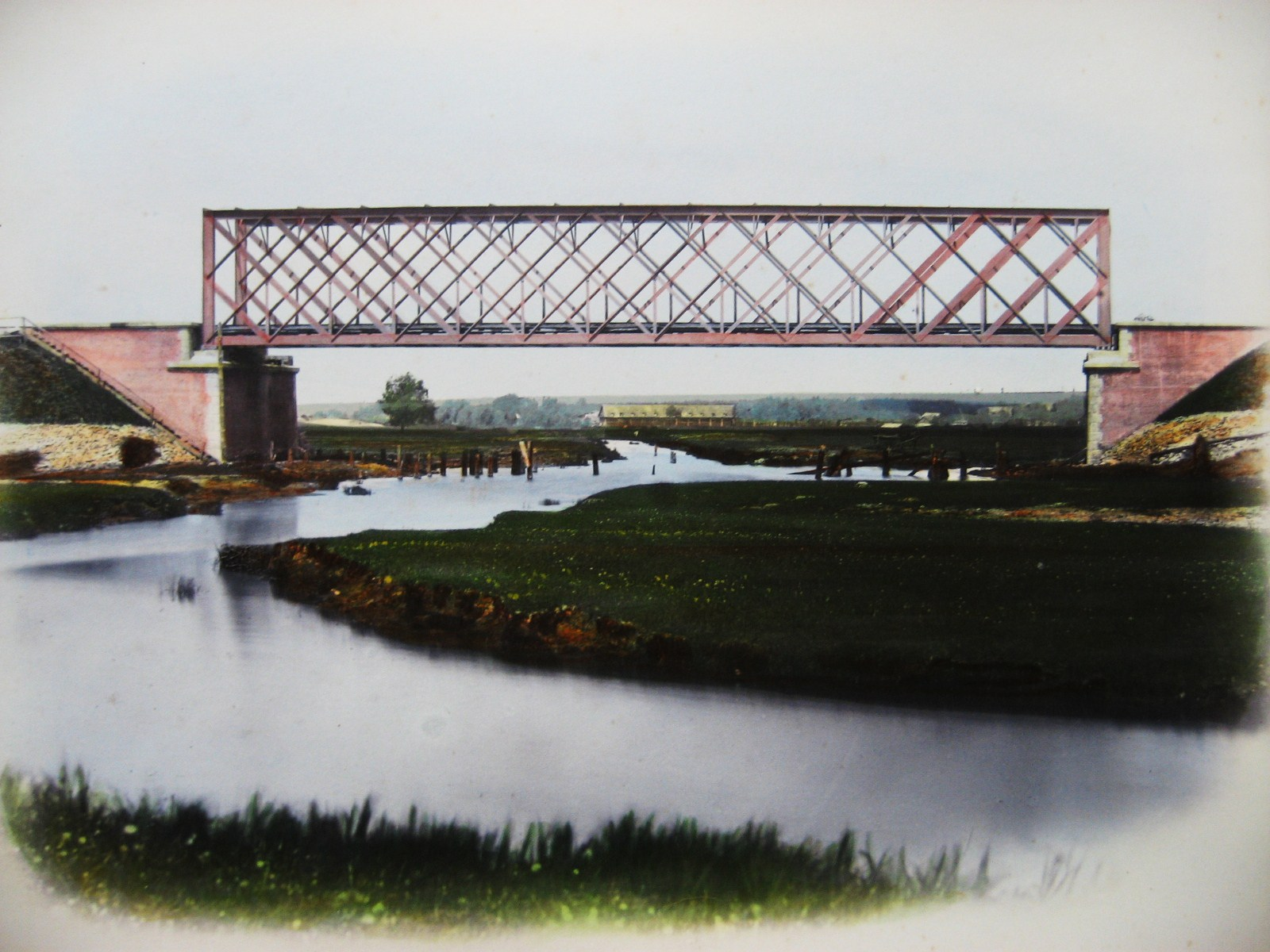 Альбом видов Курско-Харьковско-Азовской железной дороги.